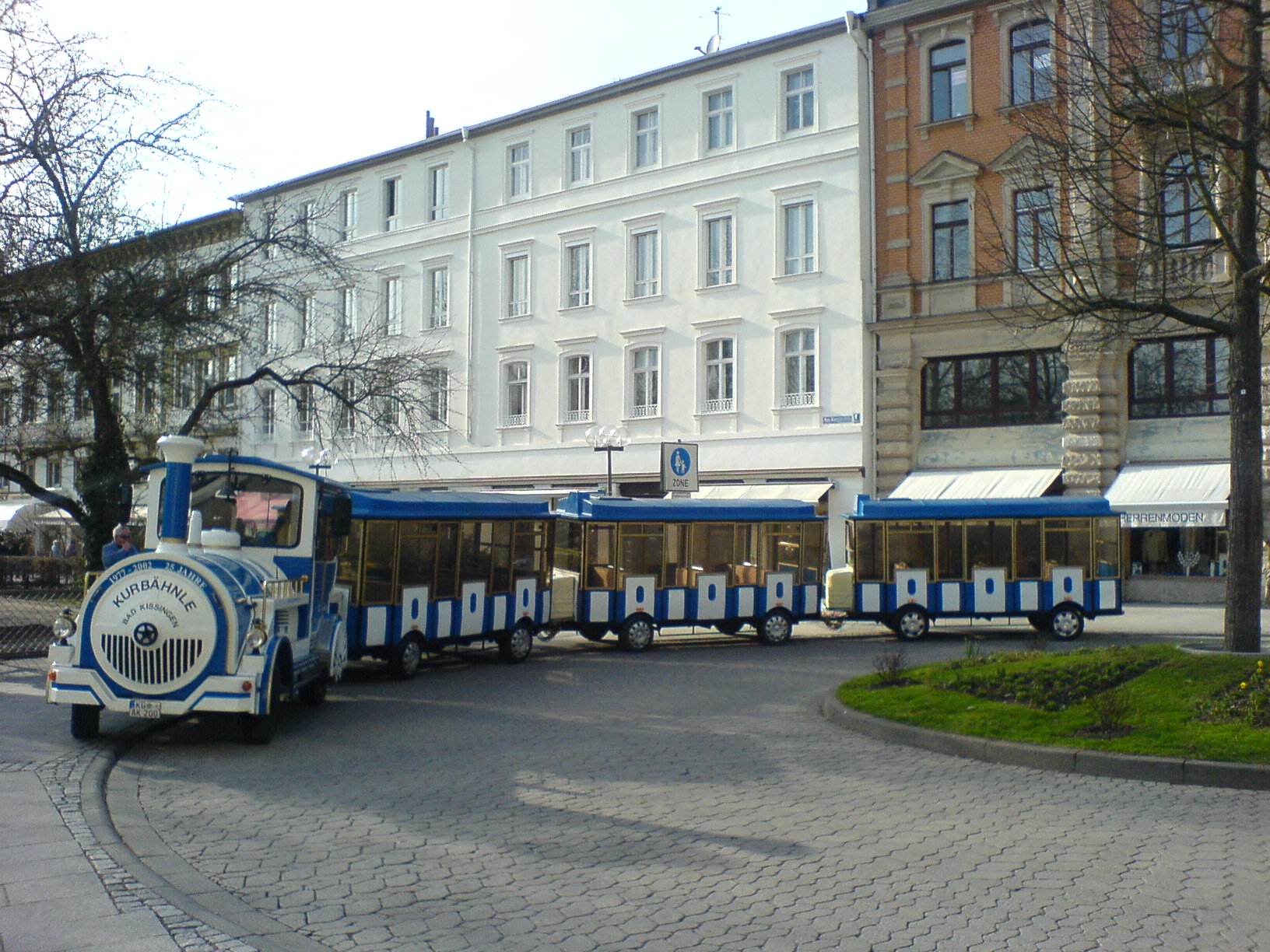 Bad Kissingen - Kurbähnle, Gesamtansicht (Hersteller: "Tschu-Tschu", Neumarkt/Opf.), Haltestelle Rondell.